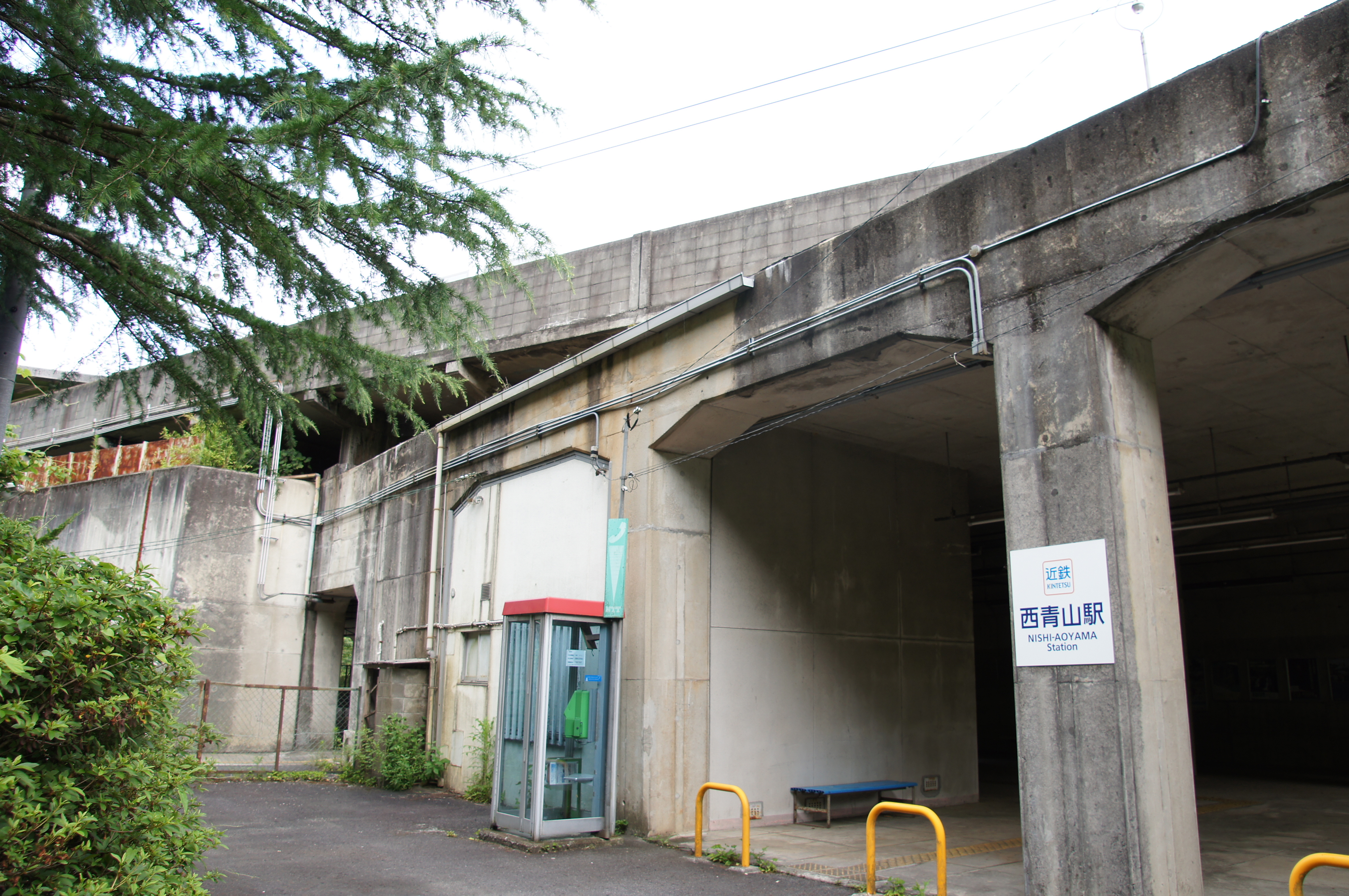 西青山駅入口